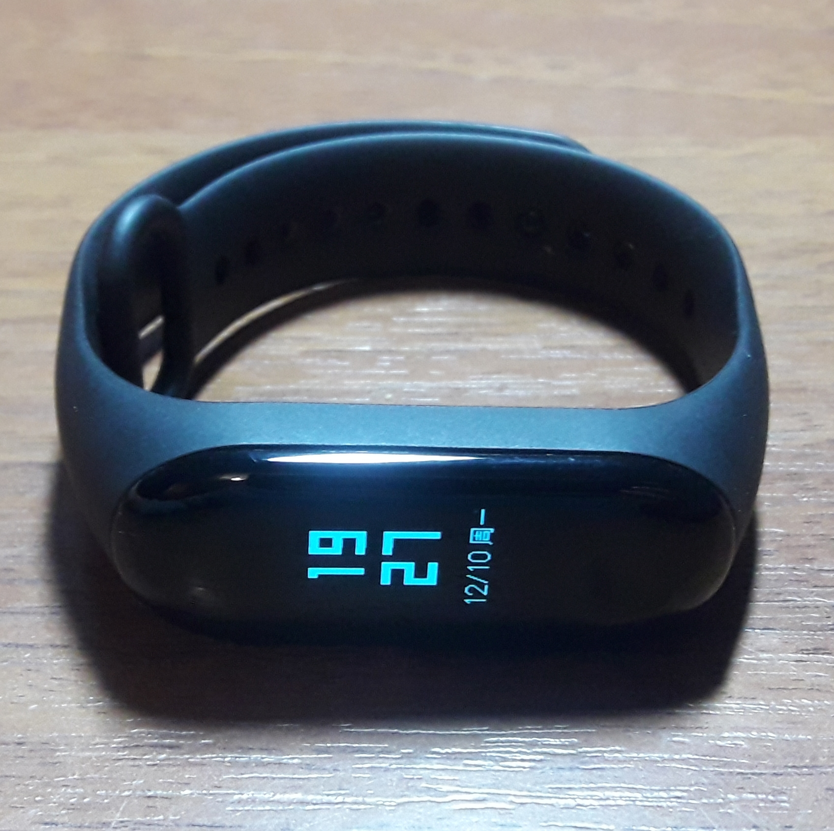 Фотографія Xaomi mi band 3